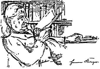 Hermann Krieger (1866-1943) lesend in seinem Haus in der Ringstraße in Malente.